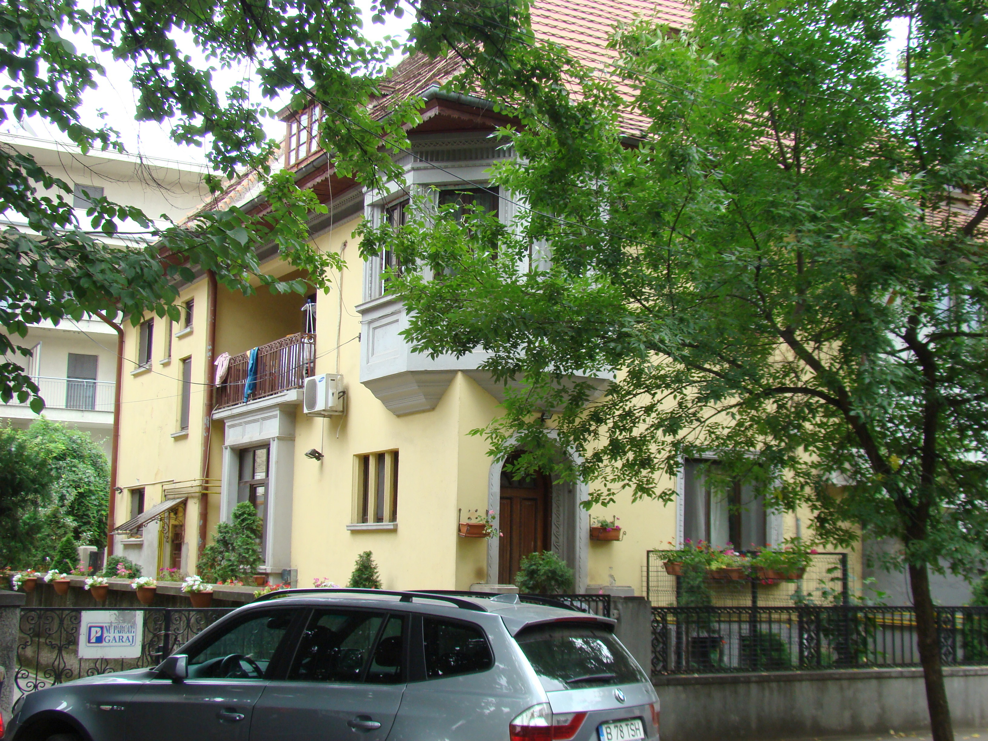 Clădire monument istoric, str. Roma, nr. 30A